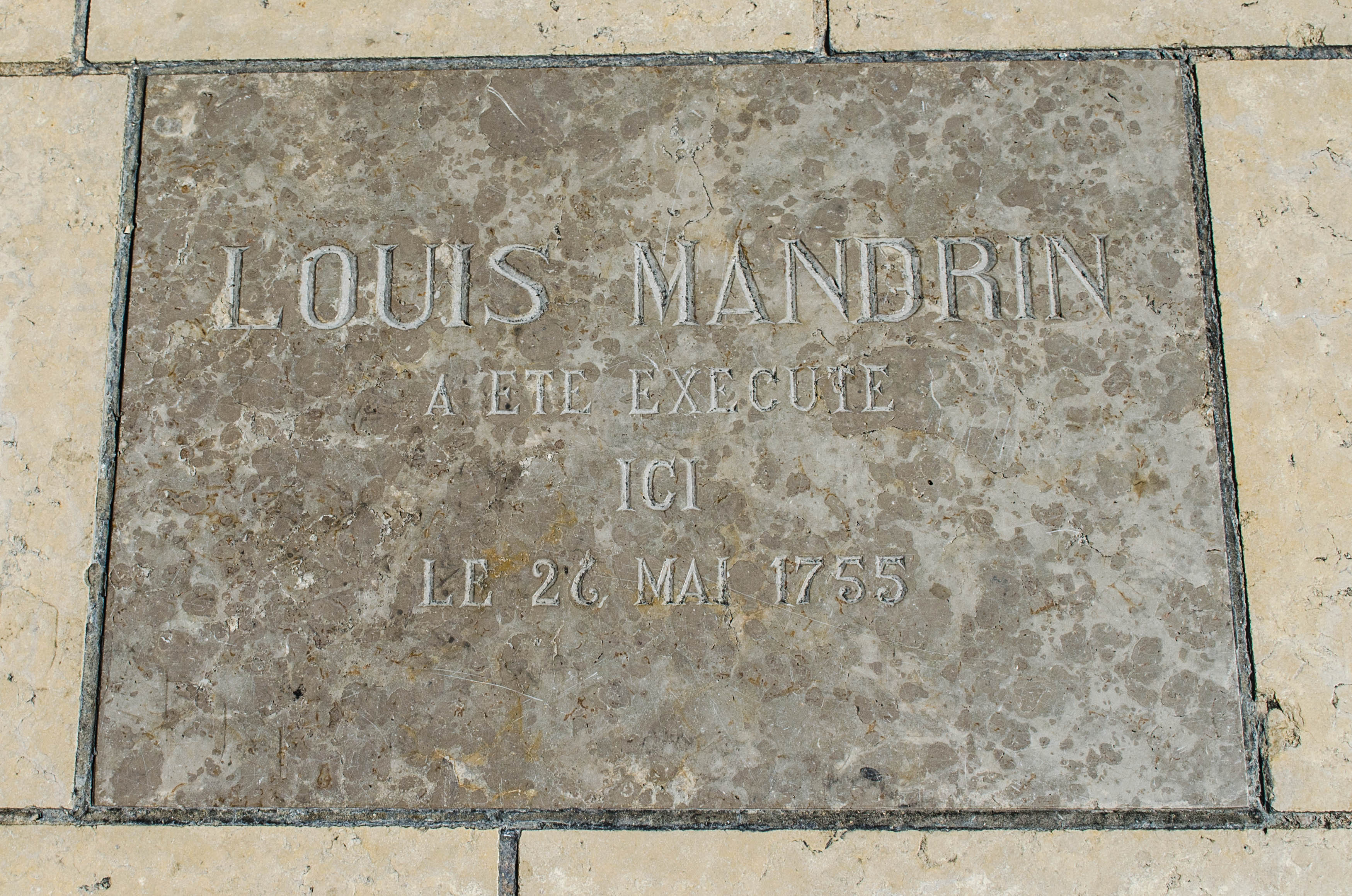 Valence, Drôme, France. Plaque commémorant l’éxécution de Louis Mandrin, place des Clercs